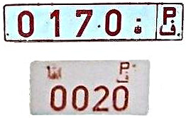 Palestine government vehicle plate